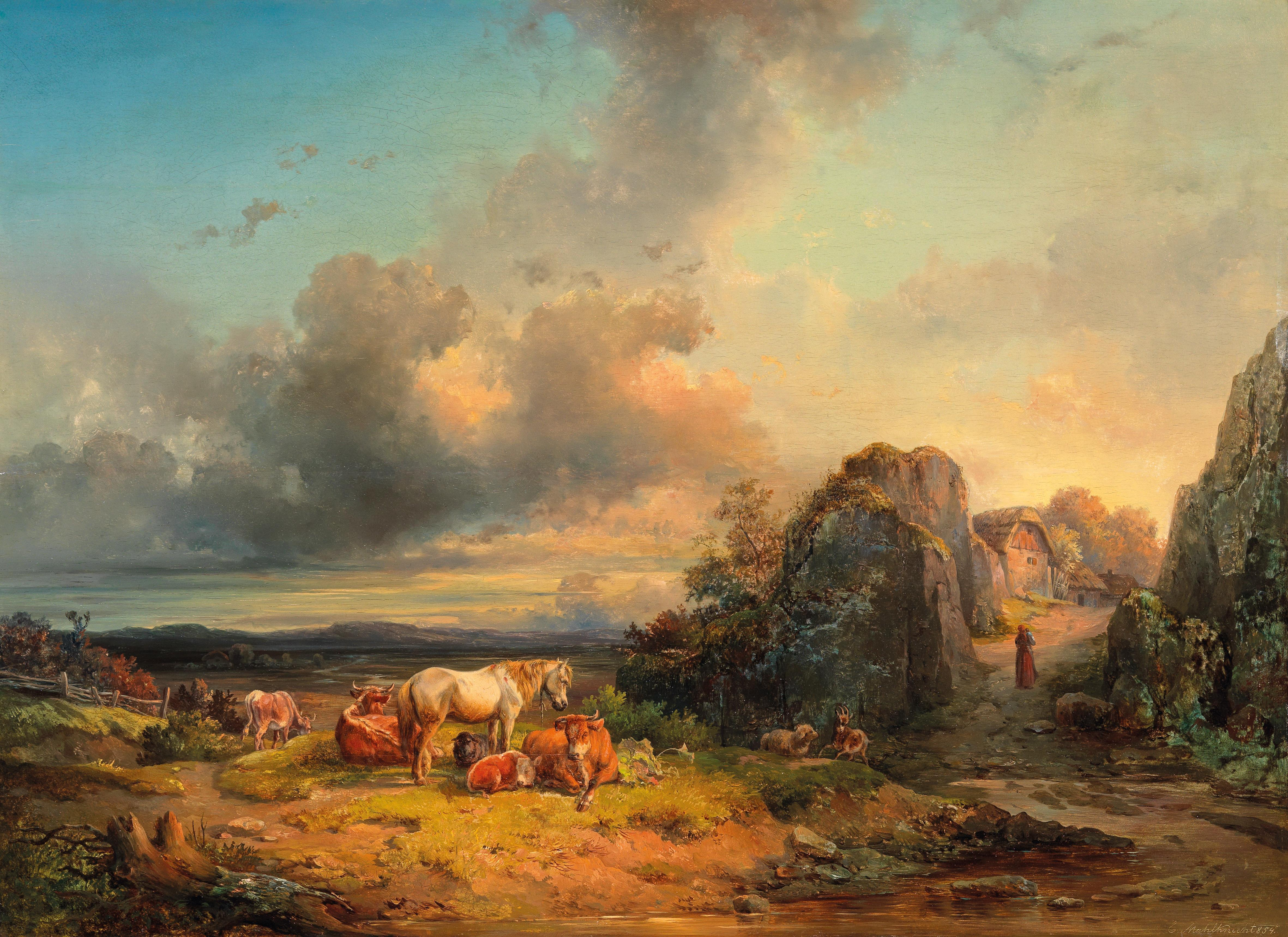 Tierherde und figürliche Staffage vor einer weiten Landschaft, signiert, datiert E. Mahlknecht (1)854, Öl auf Holz, 46,5×63 cm